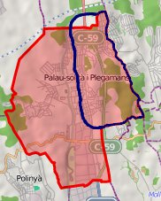 Actuals límits parroquials de Plegamans (marcats en blau). Antigament, quan aquest era un poble, els límits entre Plegamans i Plau-solità eren diferents sent Plegamans més gran.